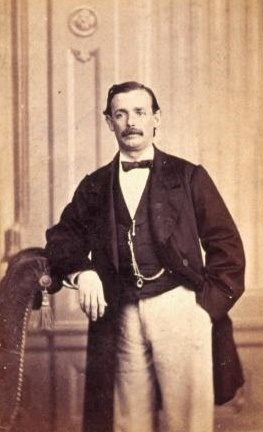 Eusebio Asquerino, fotografía de J. Laurent. Museo de Historia de Madrid